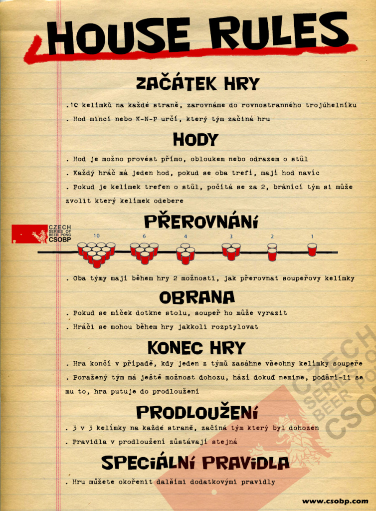 Pravidla beer pongu pro hraní doma na koleji nebo na party.